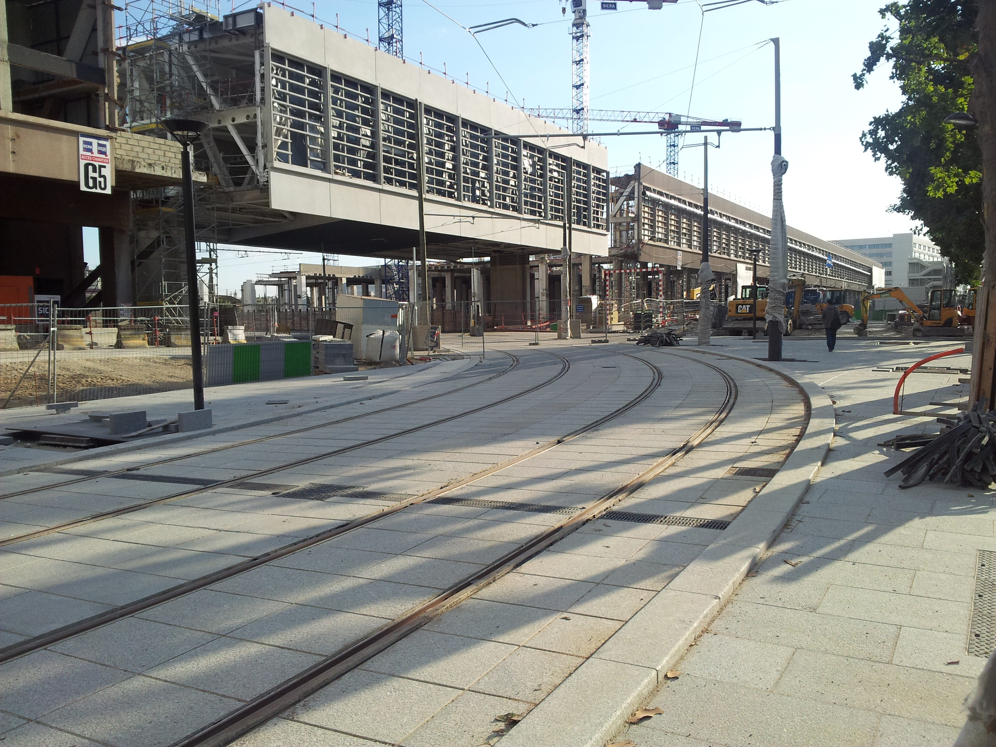 Un peu plus loin, le « décroché » par lequel le tram traversera l'entrepôt et rejoindra la gare Rosa Parks. On ne peut pas aller plus loin, c'est encore un chantier ! (742P1242)